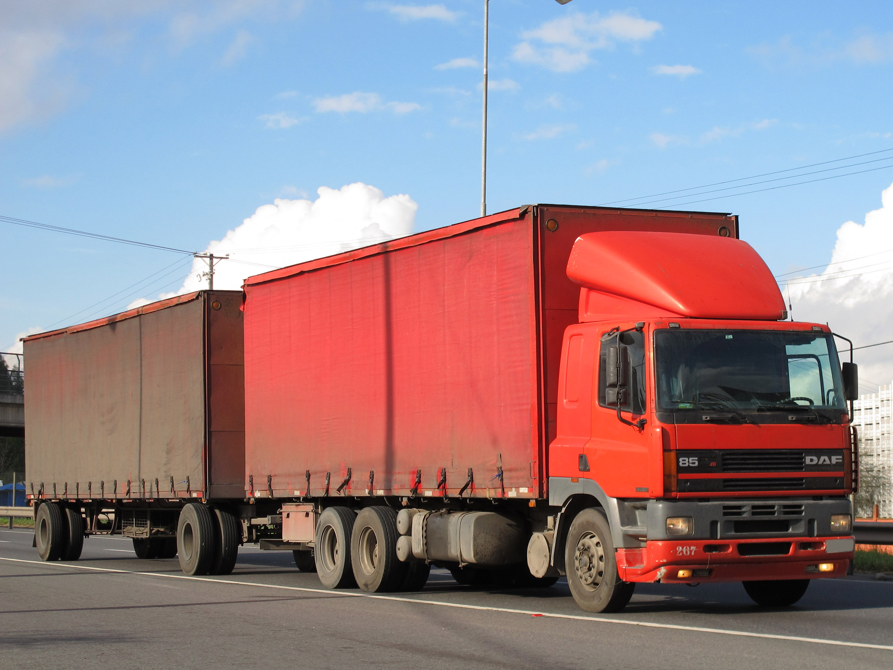 DAF CF 85 360 ATi 1997